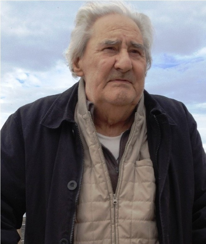 Artista Pittore da sempre, Paesaggi Inventati, oggetto frutto della fantasia, un lavoro creato dal Cav. Maestro Paolo Salvati, pittore espressionista italiano, già premiato 13 dicembre 2005 con il titolo di Cittadino Illustre della Regione Lazio, la risoluzione 1103 ha pubblicato il 30 gennaio 2006 sul bollettino ufficiale. Il 27 dicembre 2012 su proposta della Presidenza del Consiglio dei Ministri è stato insignito del distintivo d'onore di rango di Cavaliere dell'Ordine al Merito della Repubblica Italiana per meriti artistici, decorati 324601.